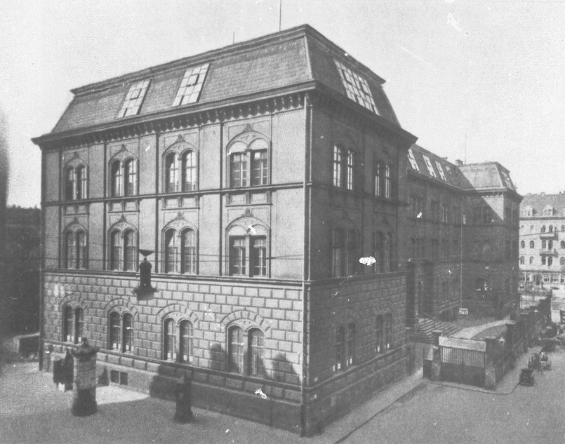 1846 bezieht die Technische Bildungsanstalt das Gebäude; 1851 umbenannt in "Königlich Polytechnische Schule"; seit 1871 "Königlich Sächsisches Polytechnikum"; 1875 neues Hauptgebäude in der Nähe des Hauptbahnhofs fertiggestellt; Gebäude am Antonsplatz 1945 zerstört